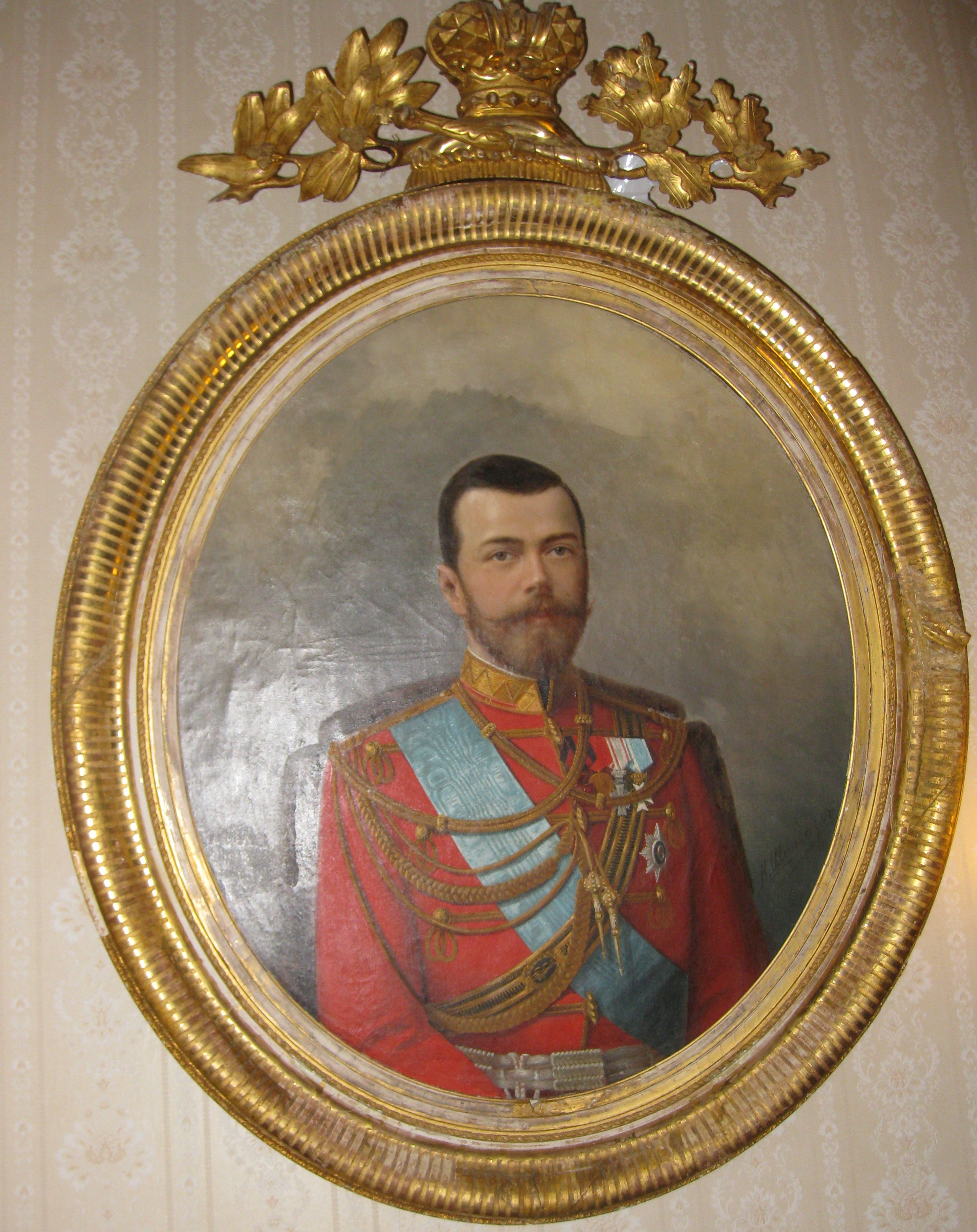 The Christian Quarter - The Russion Church הרובע הנוצרי בעיר העתיקה של ירושלים הכנסייה הרוסית